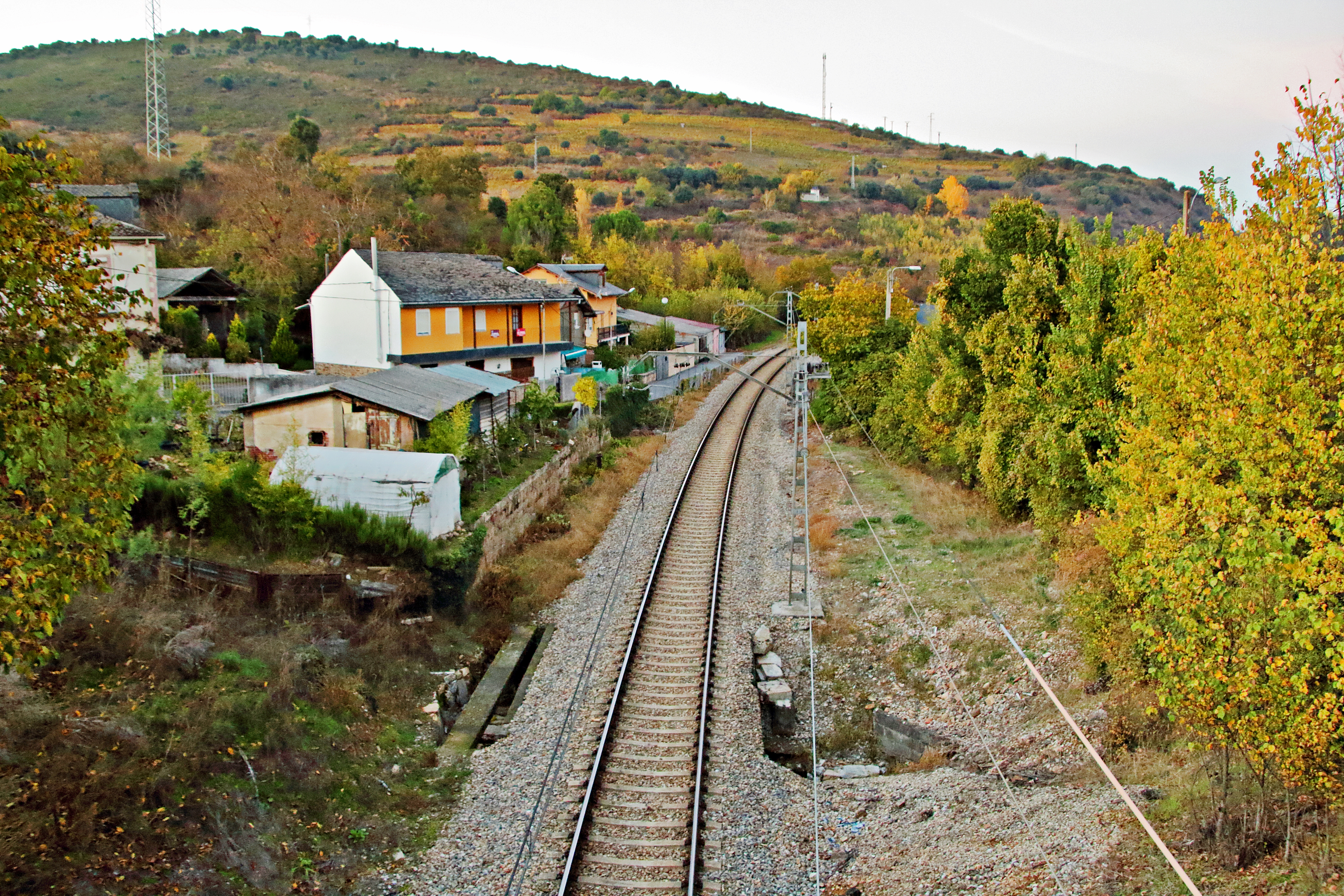 Paradela del Río, localidad de Toral de los Vados, comarca de El Bierzo, provincia de León.